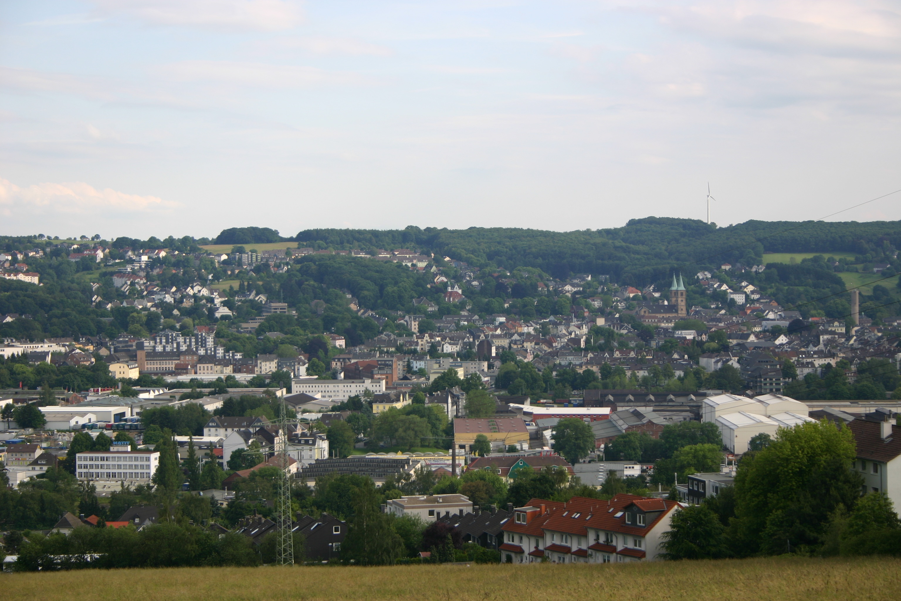 Schwelm Stadtansicht